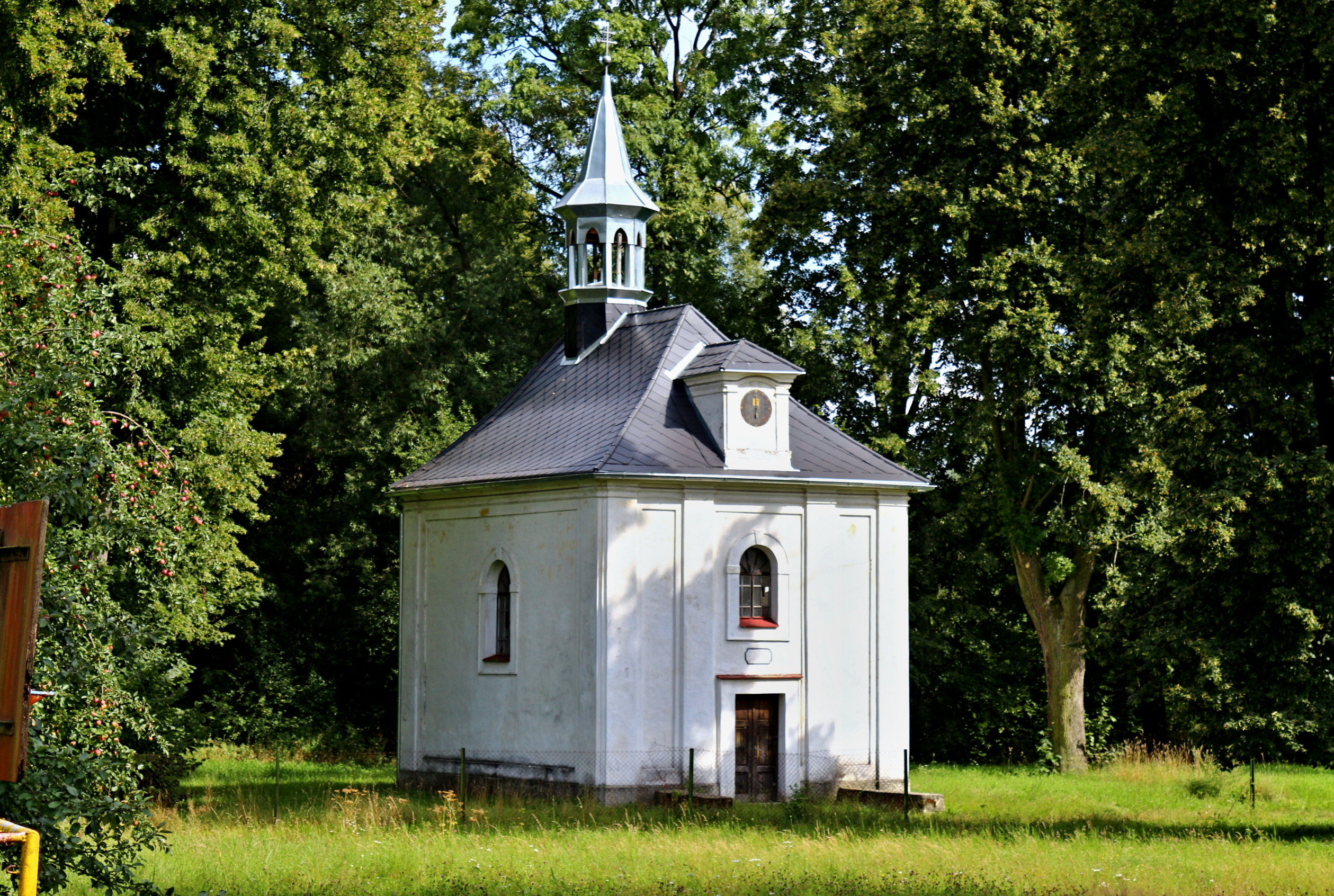 Kaple Navštívení Panny Marie ve Velkém Grunově